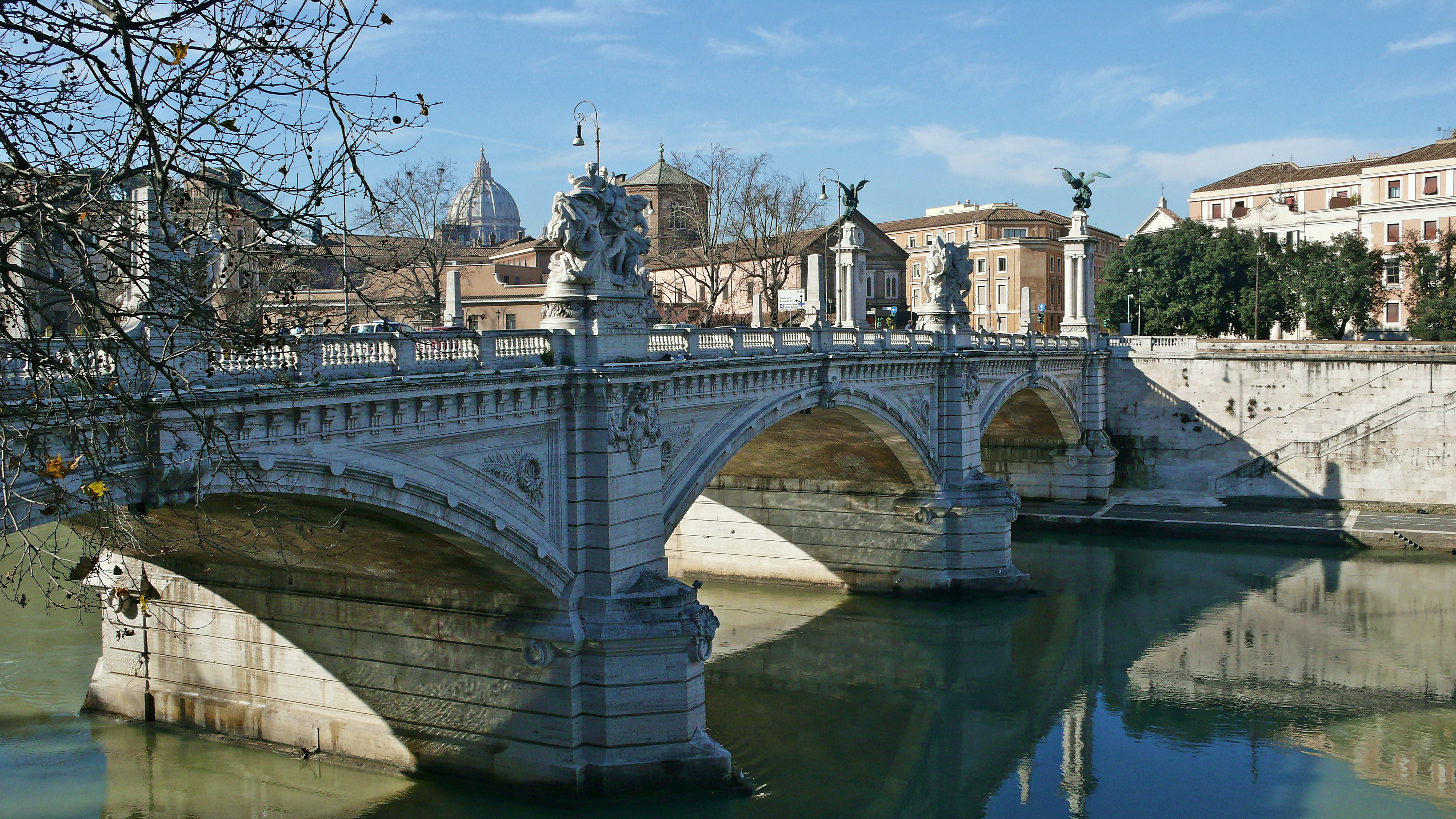 Puente Vittorio Emanuele II - Roma